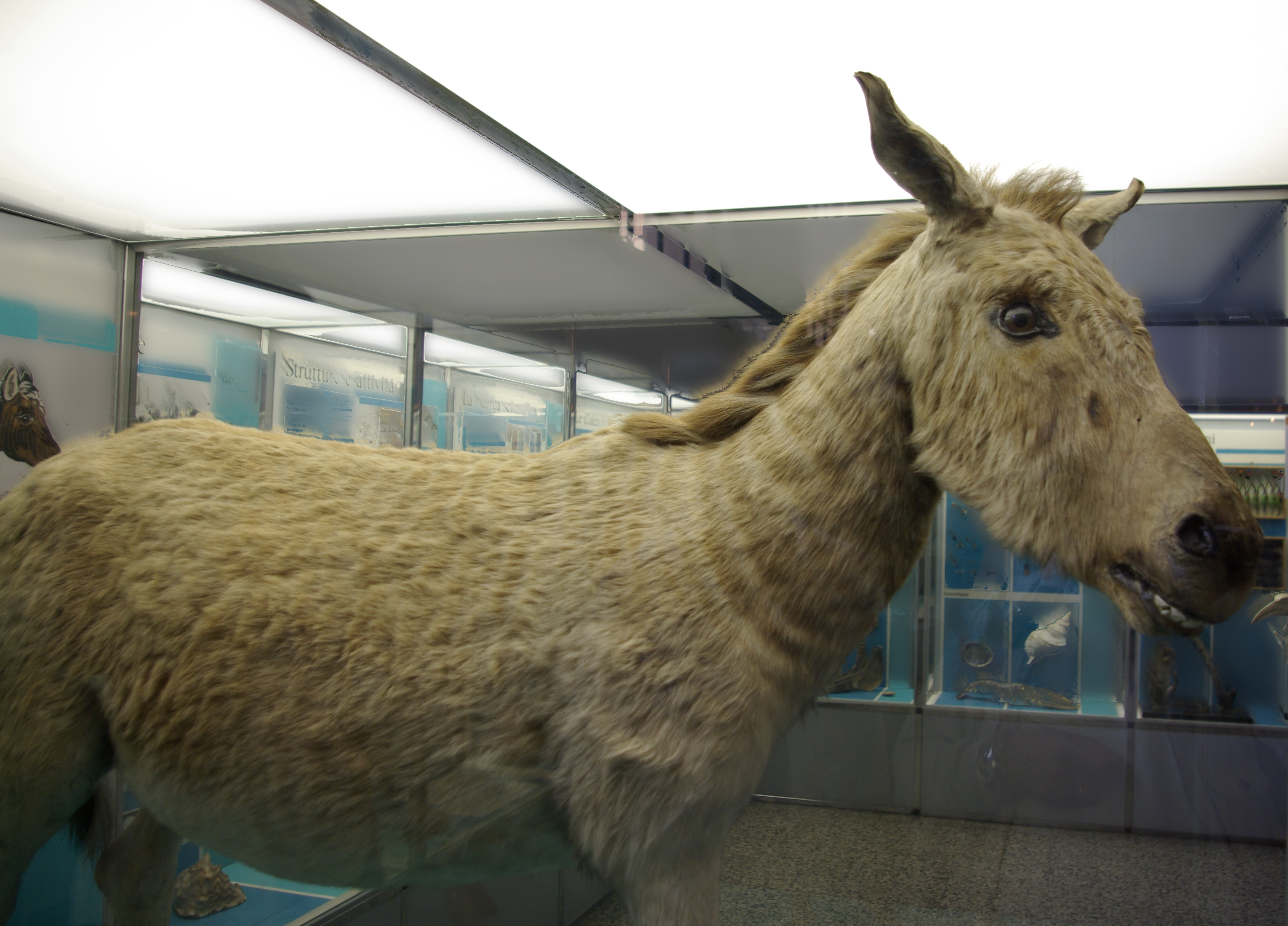 Quagga esemplare nel Museo civico di storia naturale (Milano)